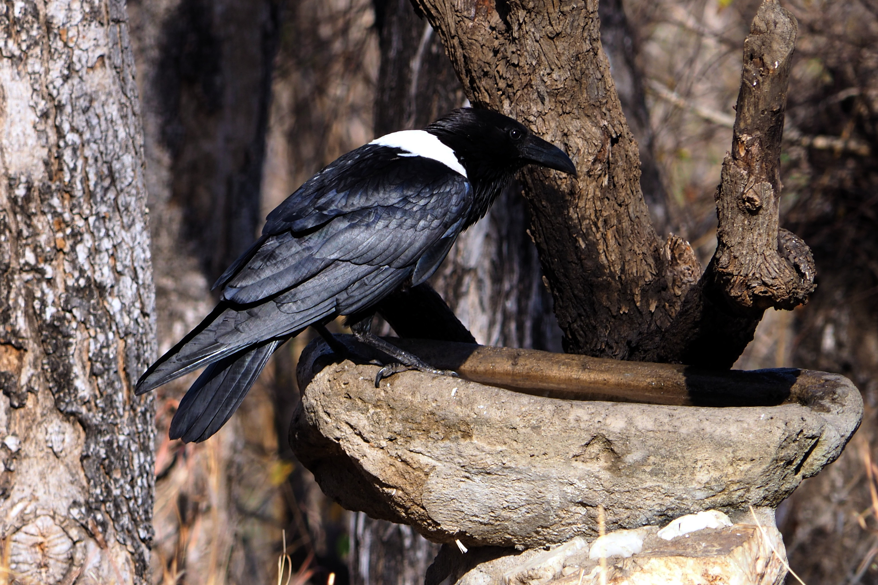 Schildrabe (Corvus albus)